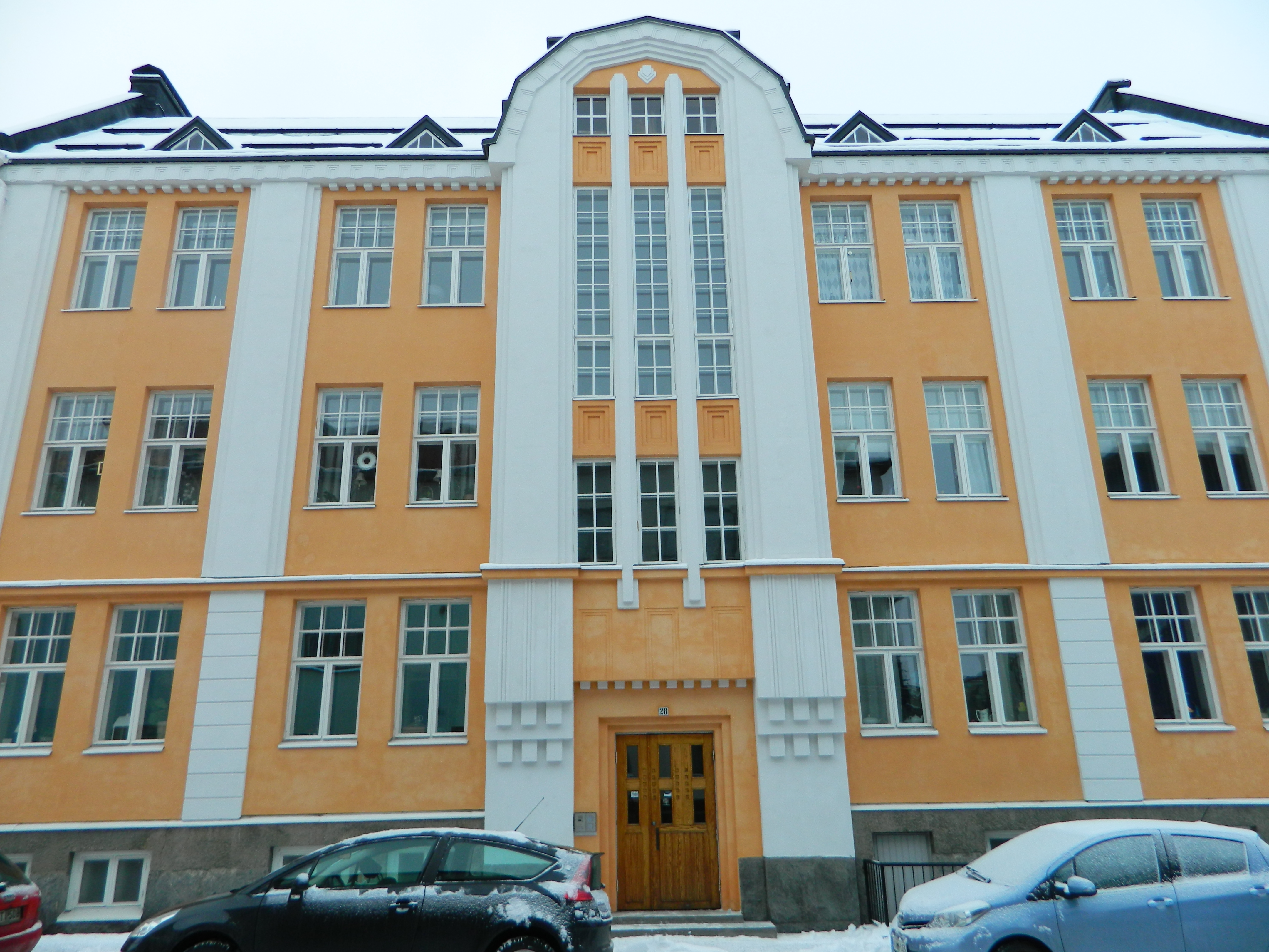 Snellmaninkatu 28